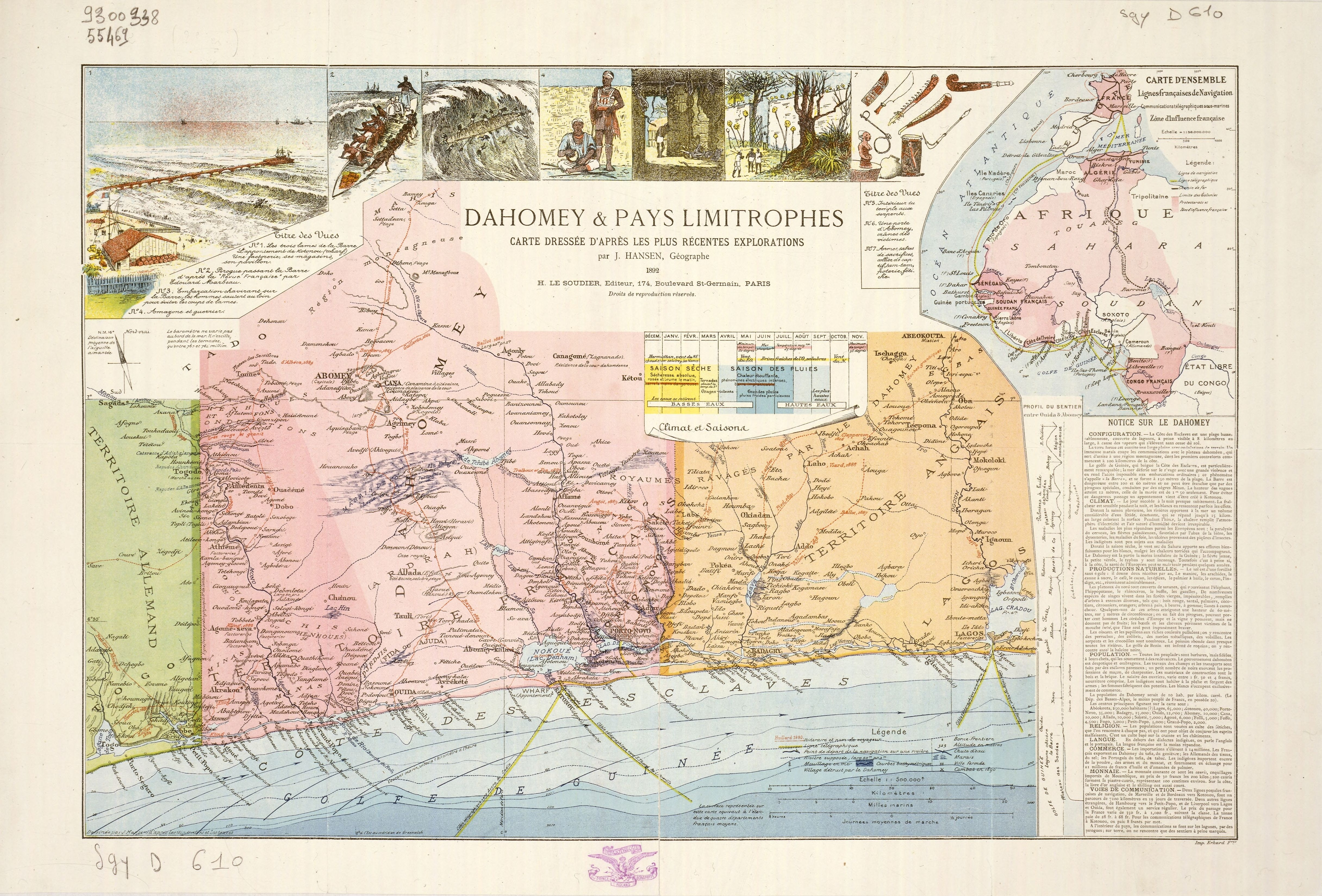 Dahomey & pays limitrophes / carte dressée d'après les plus récentes explorations par J. Hansen, géographe (1849-1931).